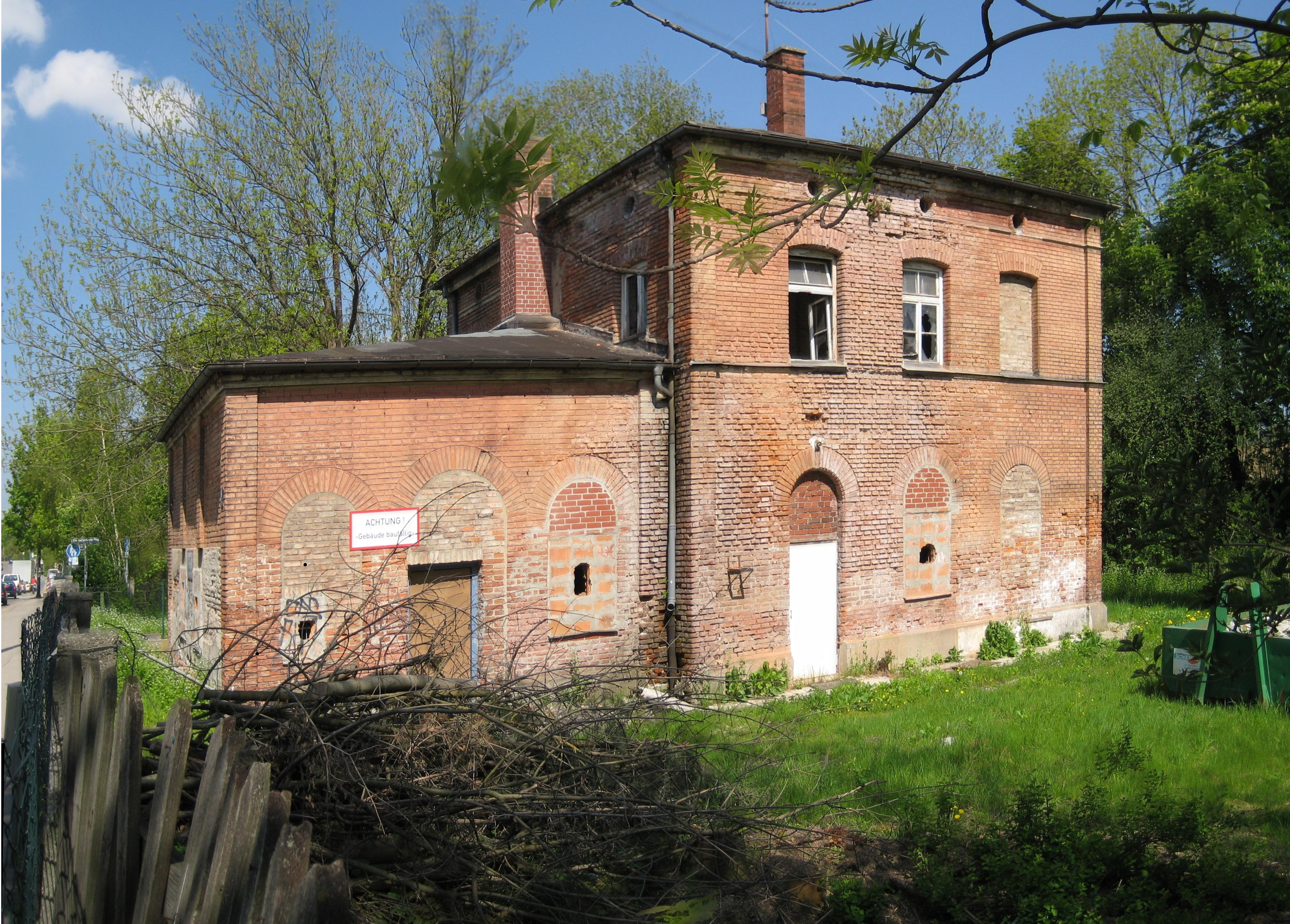 Altes Wasserpumpenhaus (1854) westlich des Bahnhof München-Pasing